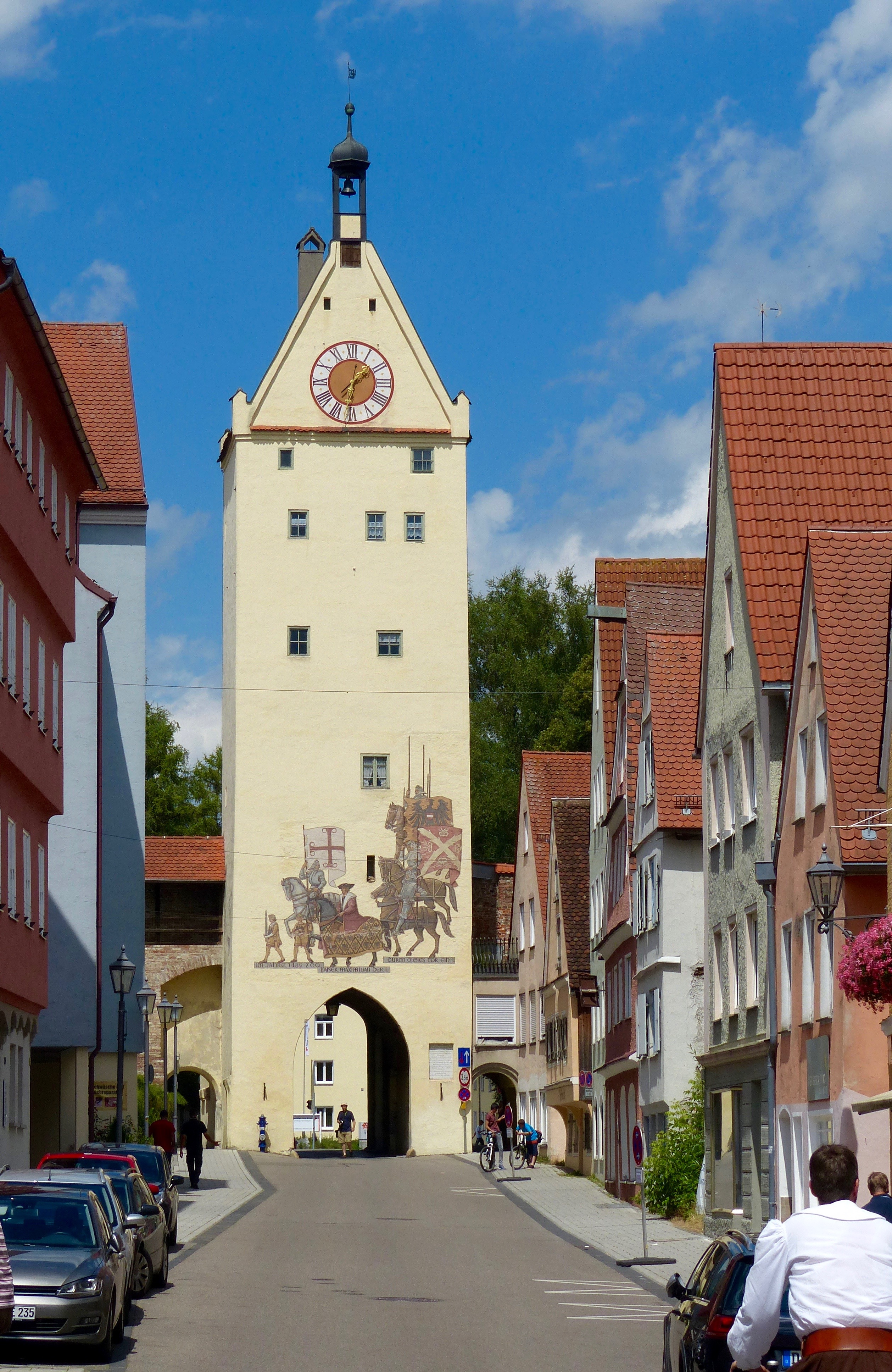 Memmingen: Ulmer Tor während der WallensteinfestspieleThis is a photograph of an architectural monument.